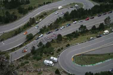 Pelotón de ciclistas en pleno ascenso de las rampas de Ordino-Arcalís en la Vuelta Ciclista a España de es:2005